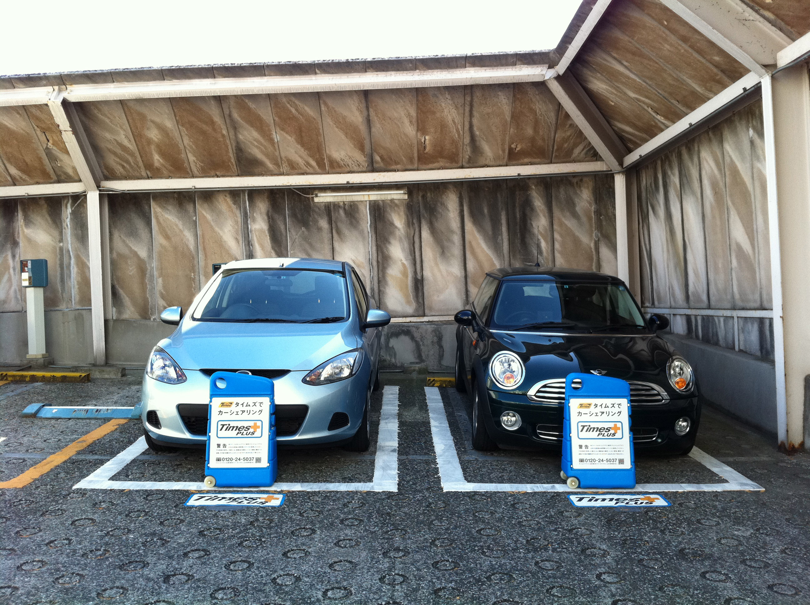 カーシェアリング業者・TimesPlusの車両